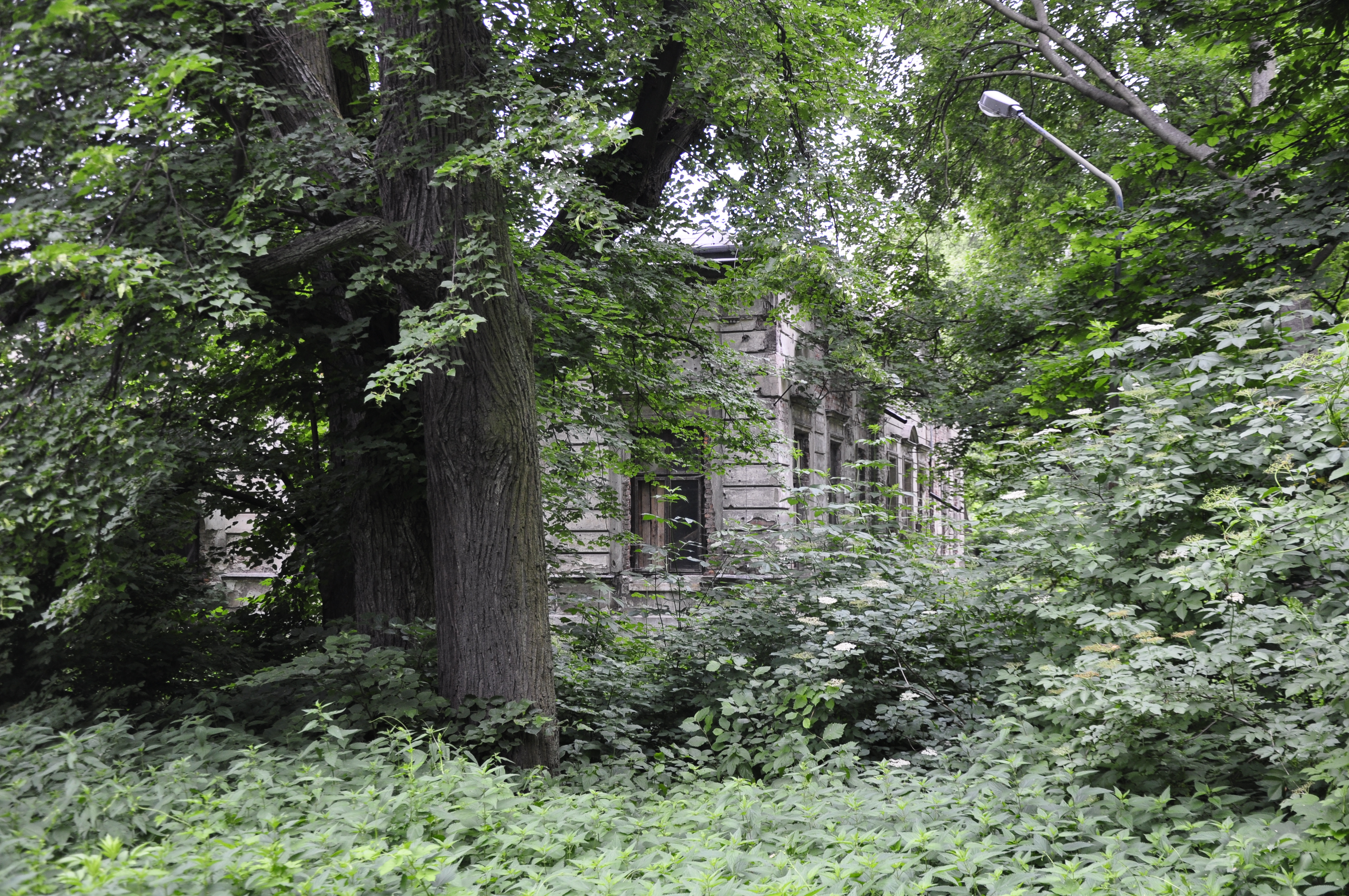 Warschau, Mlociny, Brühl-Palast, Rückseite eingewachsen von Süden fotografiert